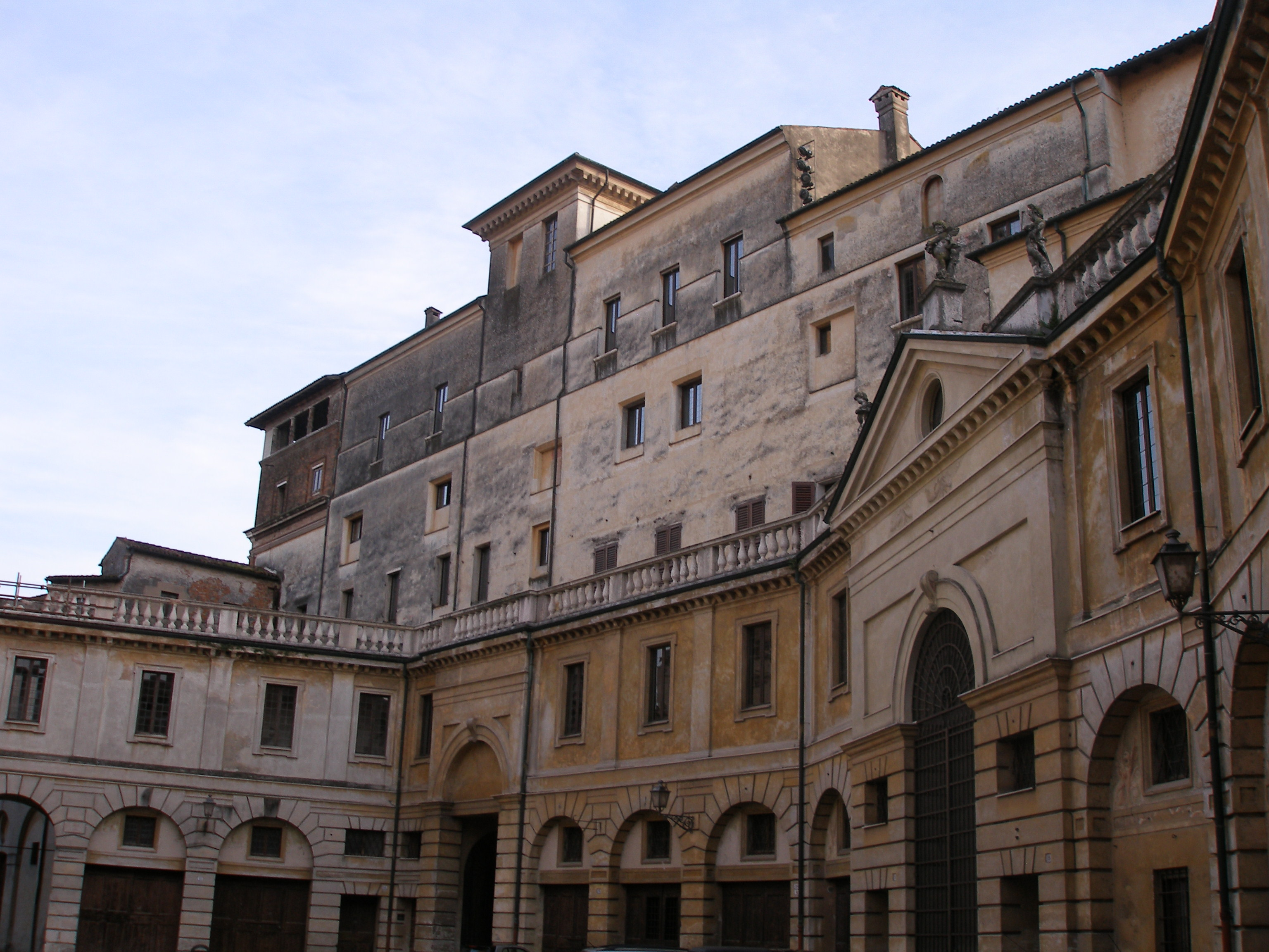 Mantua